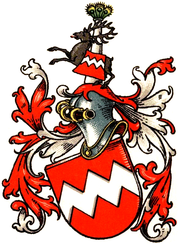 Wappen der von Campe